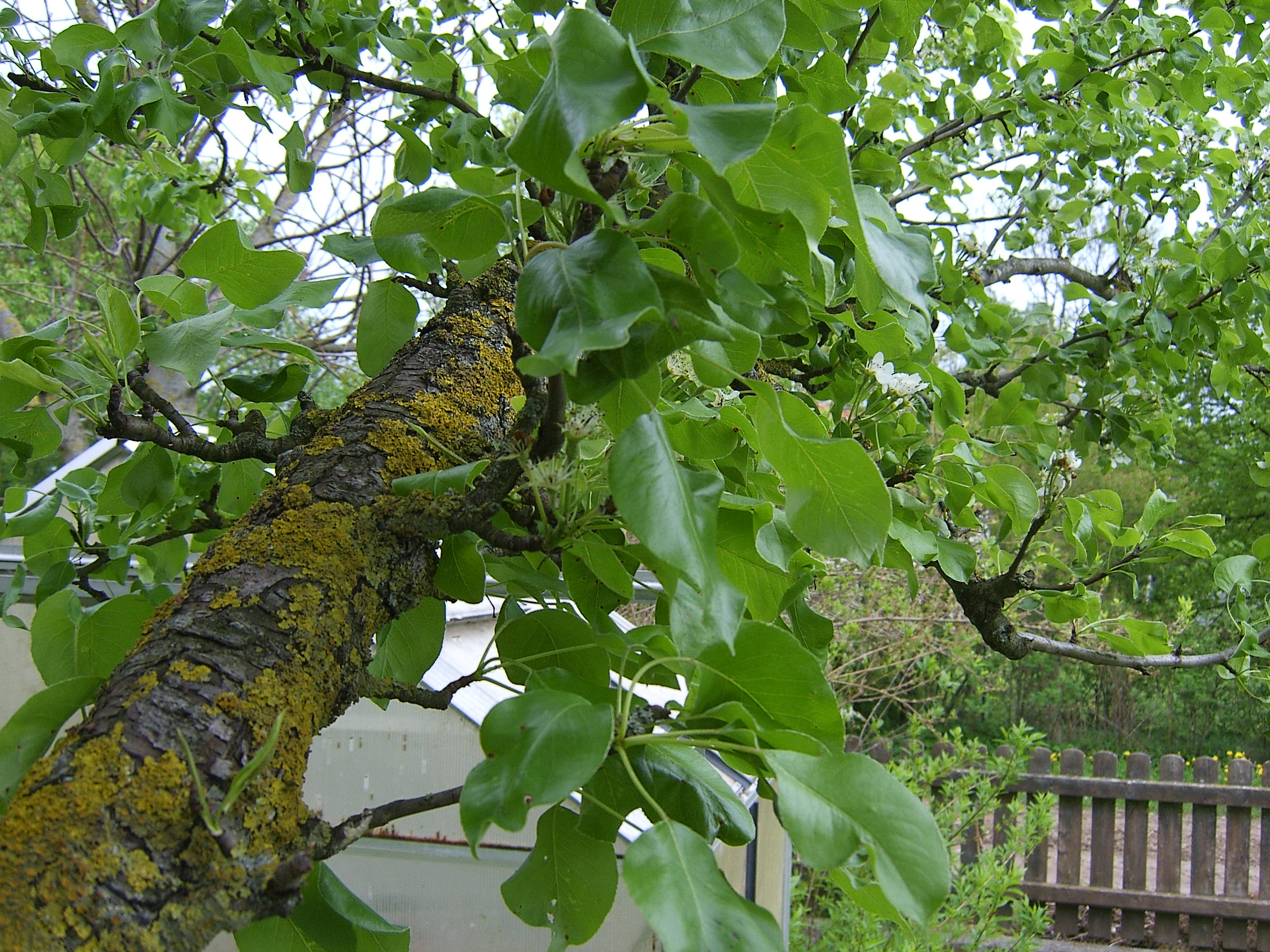 Birnenbaum (Pyrus communis)